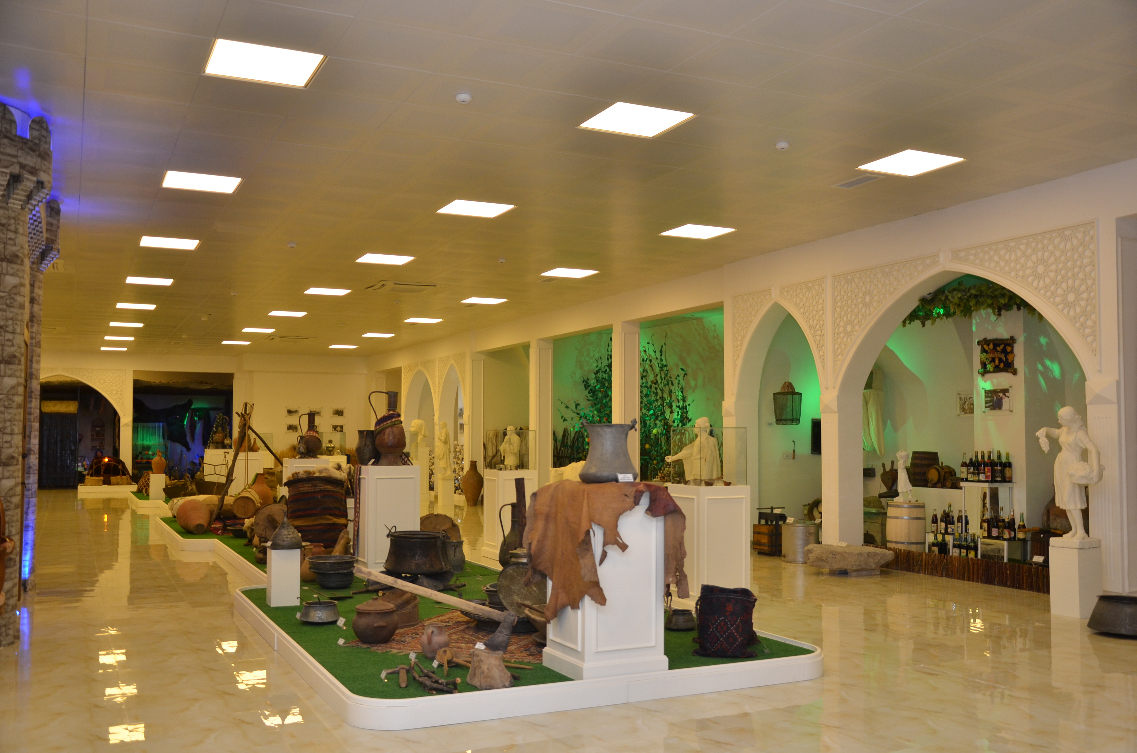 Muzeyin tam gorünuşü